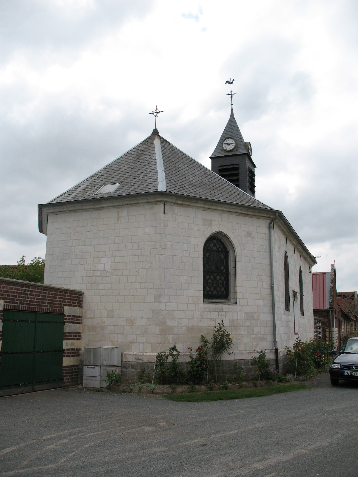 Eglise de Lahoussoye